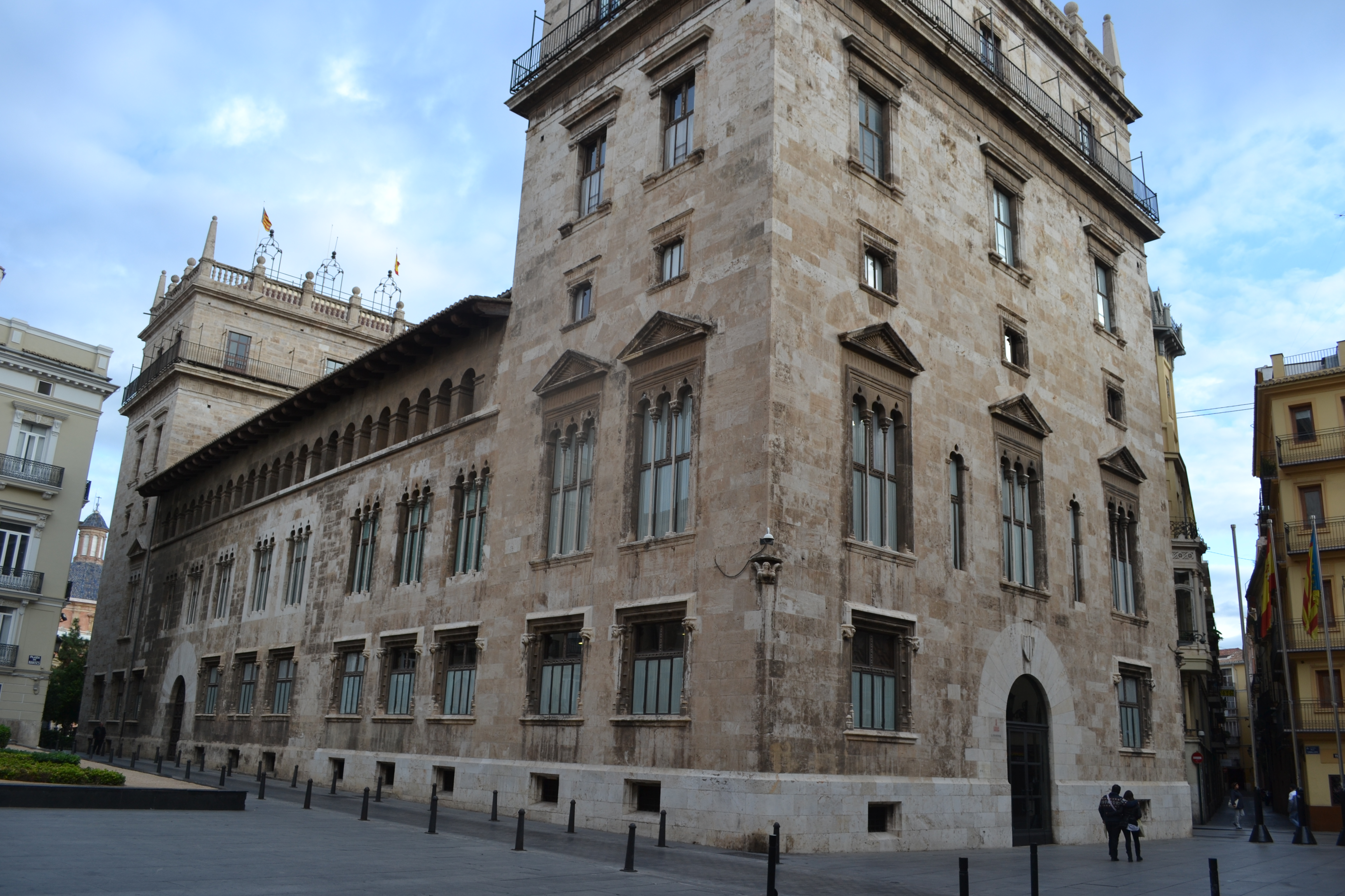 Palau de la Generalitat Valenciana.